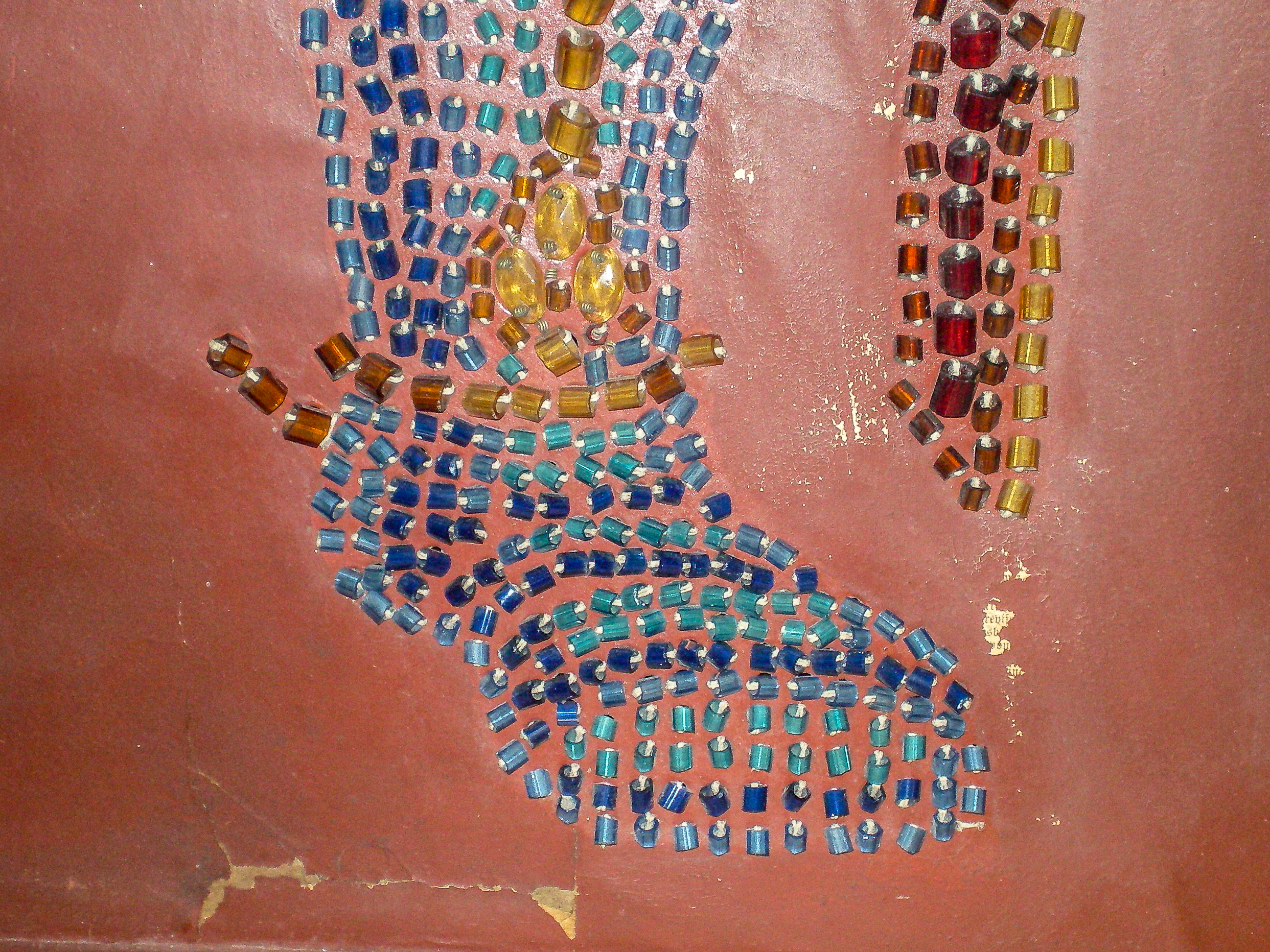 Detailaufnahme des linken Fußes des rechten Wächters vom Heiligen Grab in Iffeldorf